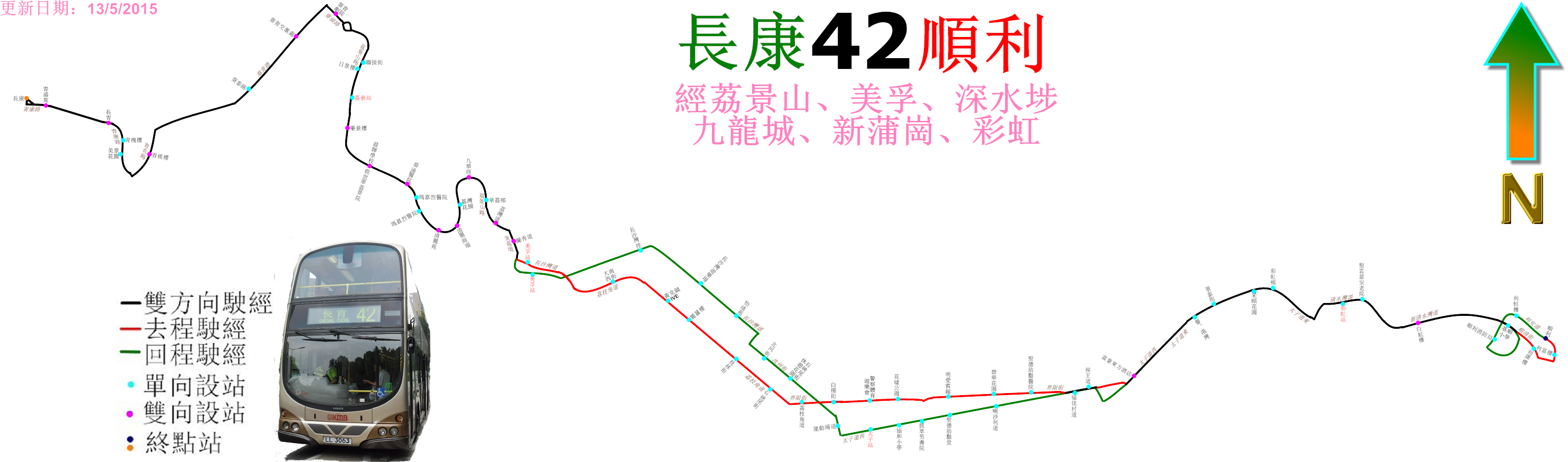 中文（香港）: 九巴42線的走線圖